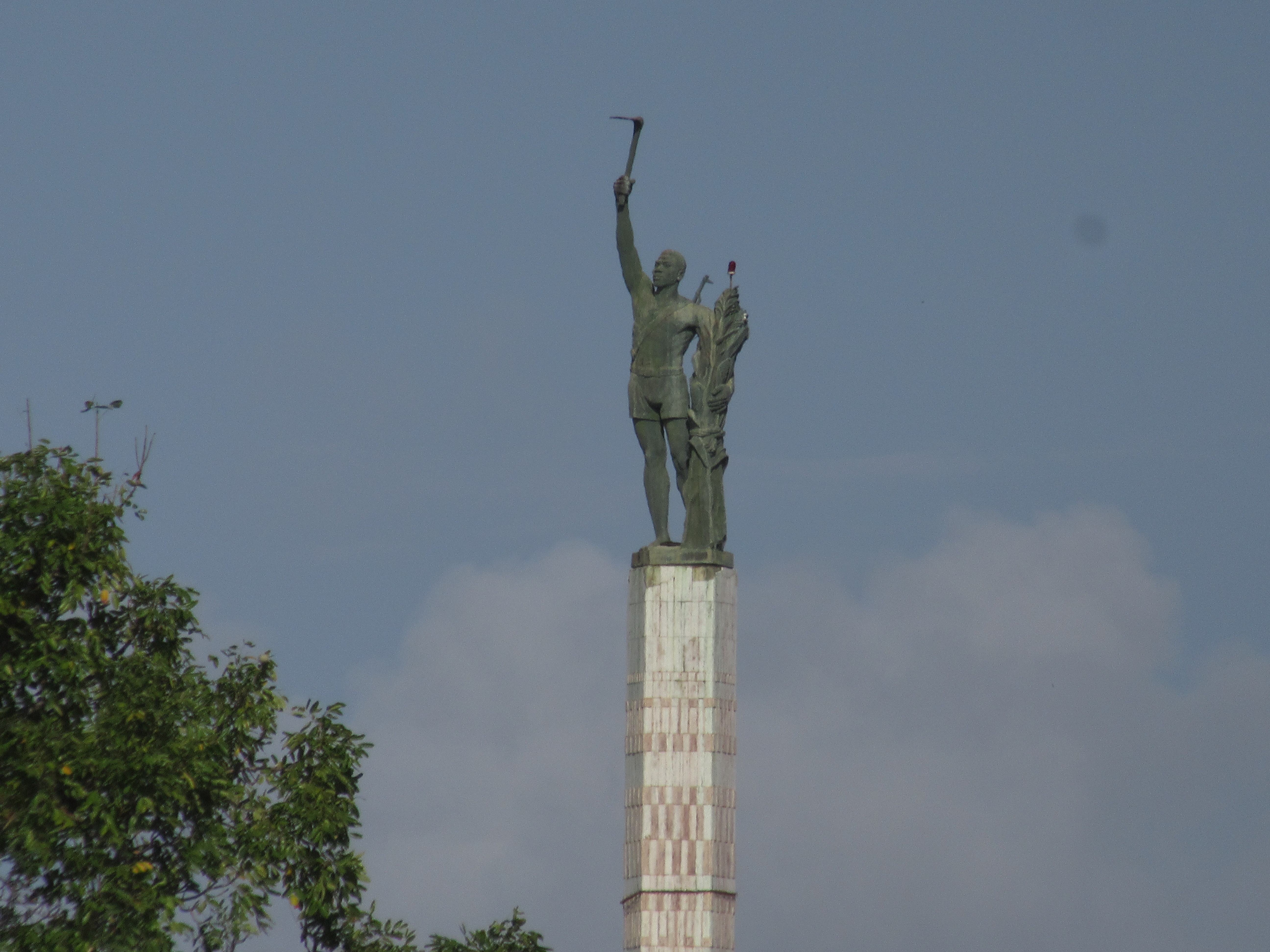 Place de l'Étoile rouge A Cotonou, la place de l’Etoile Rouge de Cotonou est l’une des plus marquantes de l’histoire socio-politique du Bénin. Située en plein cœur de la ville capitale économique du pays, elle est un véritable monument, symbole de l’adhésion du régime révolutionnaire à la doctrine « marxiste-léniniste » en octobre 1974. Comme vous l’aviez demandé, vous trouverez dans cet article l’histoire de cette place et ce à quoi elle sert dans la vie courante des Cotonois. Wikidata has entry Q25384162 with data related to this item.